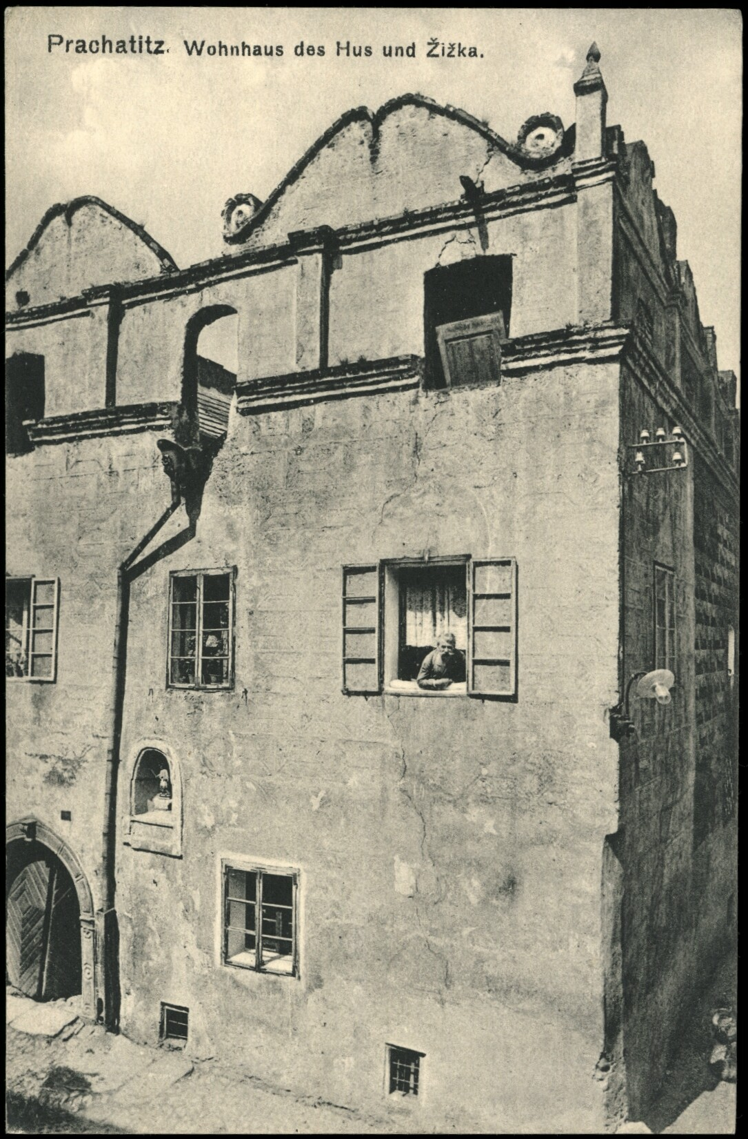 Husův dům v Prachaticích, stav před rokem 1913.